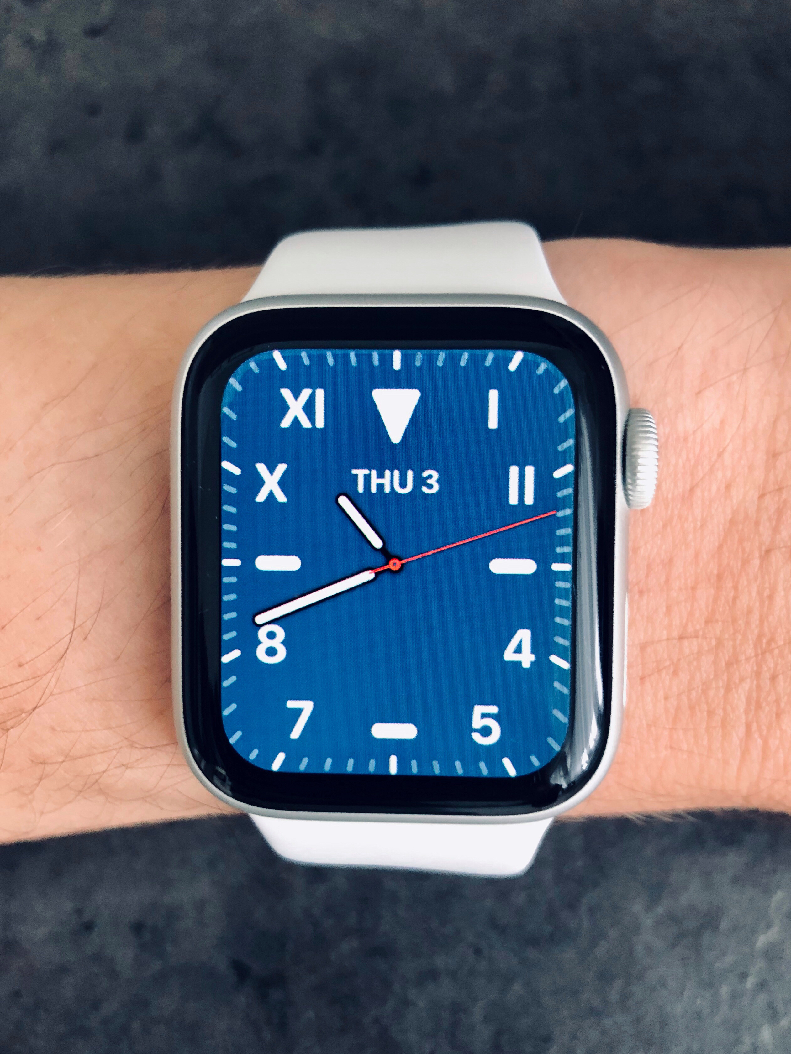 Apple Watch 4 (40 mm, Aluminiumgehäuse in Silber) mit dem digitalen "Ziffernblatt California".